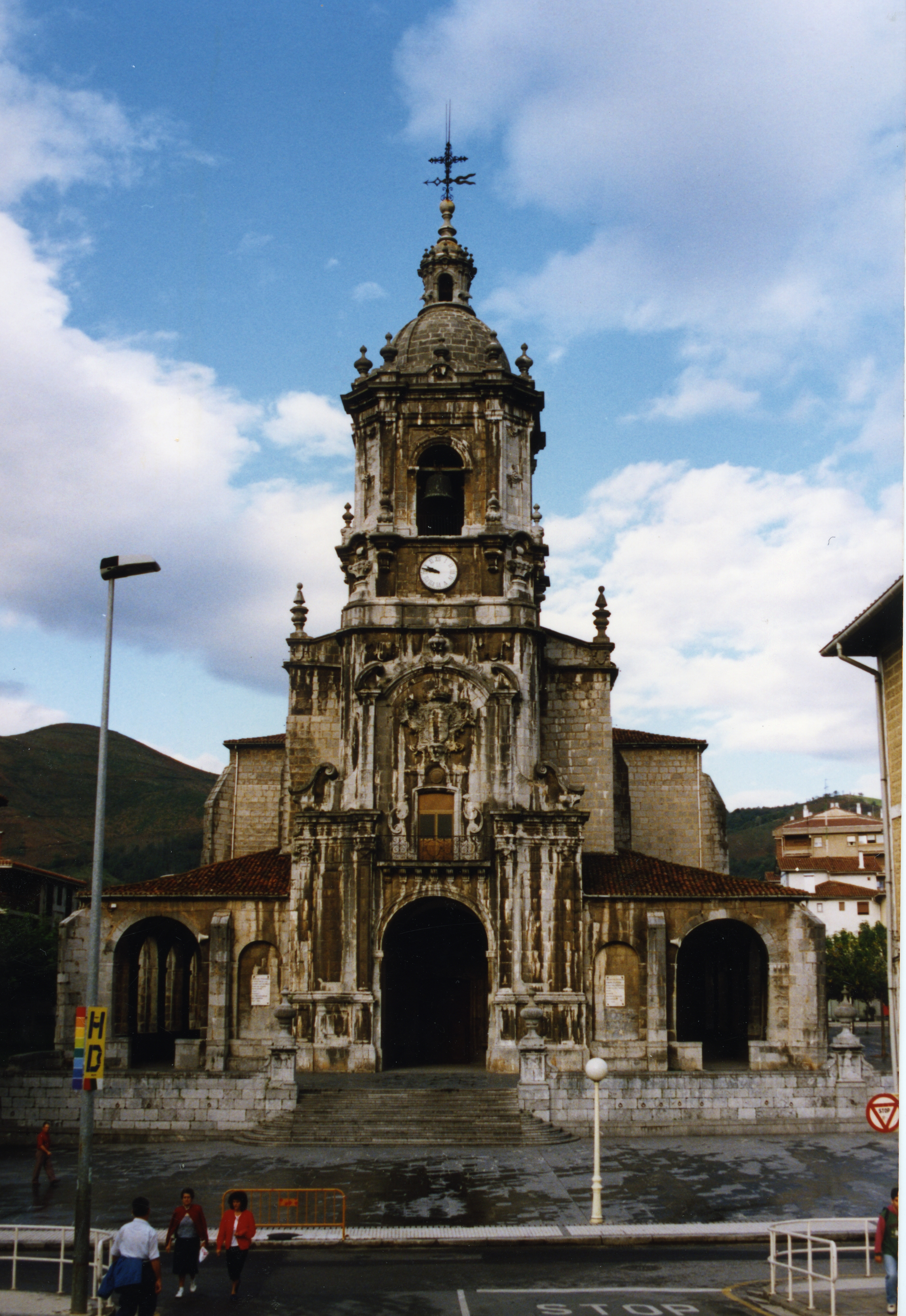 San Martin eliza. Aiurri 6 zbk. 26. orr.